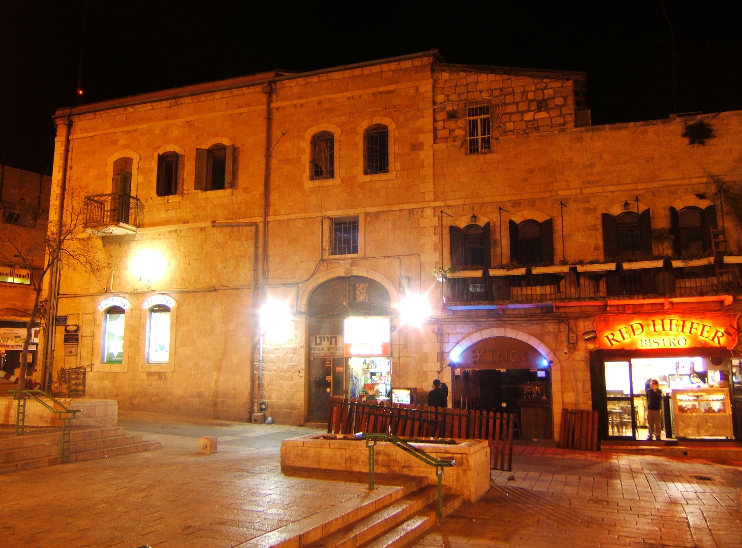 31 Jaffa Road, Jerusalem